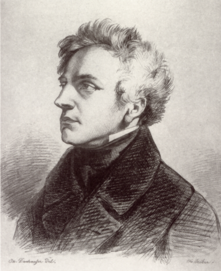 Portrait of Johann Peter Krafft